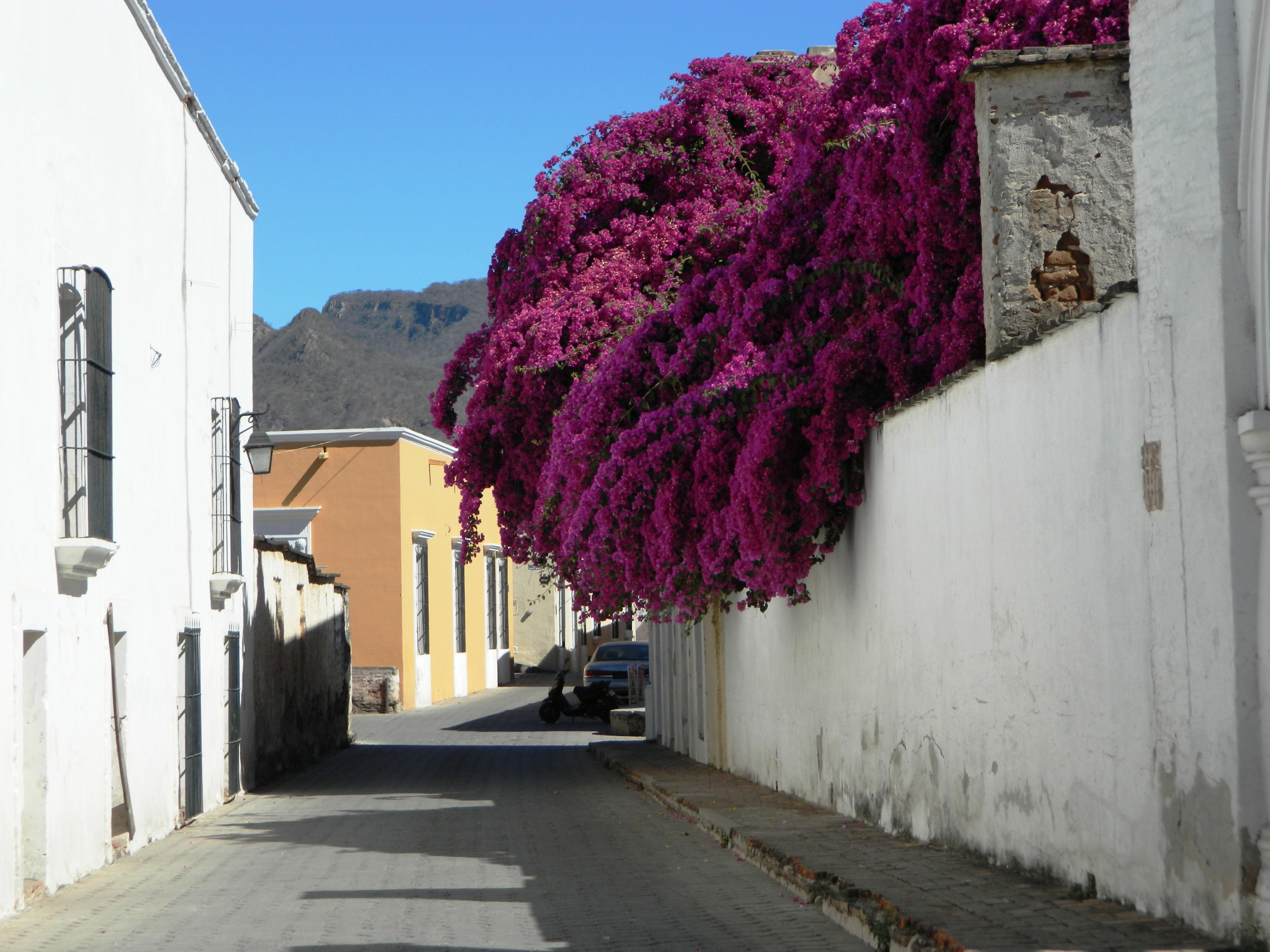 Típica calle de Álamos, Sonora con bellas Bougainvilleas